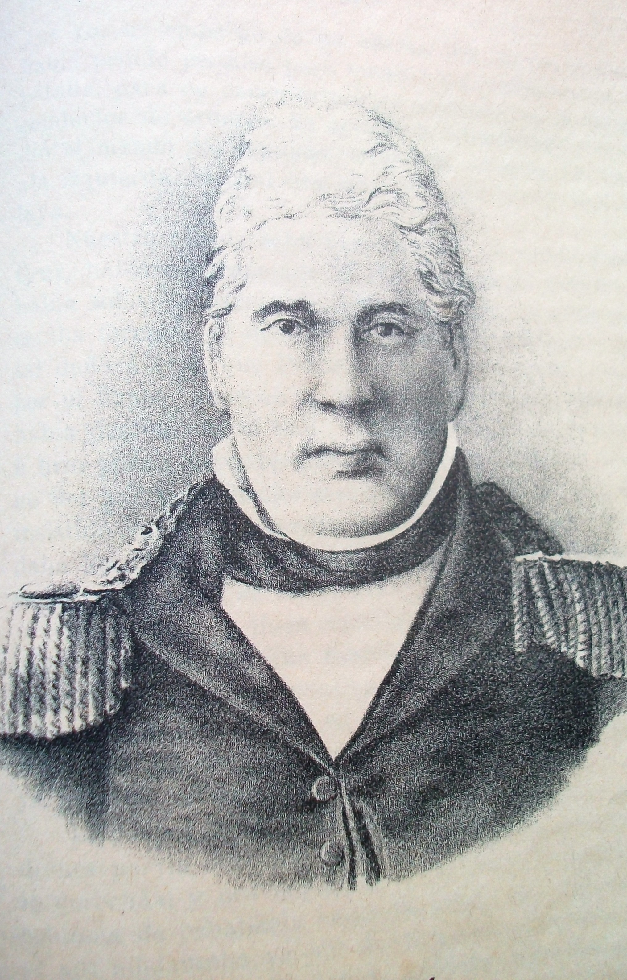 Cornelio Zelaya. Memorias del General Gregorio Aráoz de la Madrid. Publicación Oficial. Tomo I. Buenos Aires. Lit., Imp. y Encuad., Guillermo Kraft. Calle Cuyo 1124. 1895.